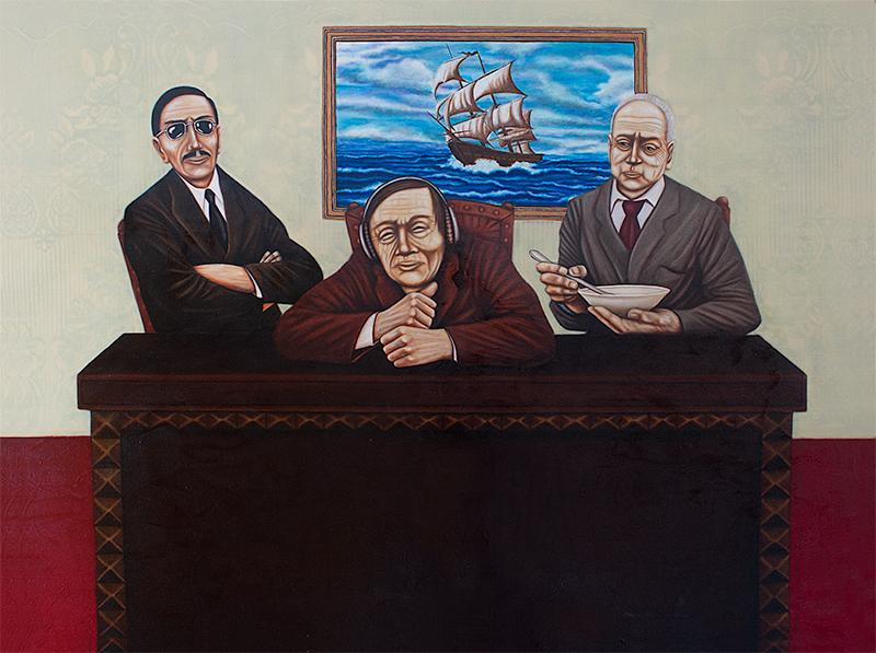 Toomas Kuusingu õlimaal lõuendil kannab pealkirja "Kolm Ahvi" ning on valminud 2012. aastal. Autoril on maali motiivide ainetel ka linoollõige samast aastast.